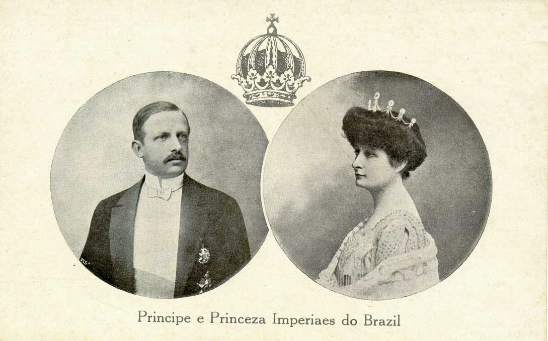 Cartão postal com as fotografias de Luís, Príncipe Imperial do Brasil e sua esposa, dona Maria Pia de Bourbon Duas Sicílias. Embaixo está escrito em português antigo: "Principe e Princeza Imperiaes do Brazil"